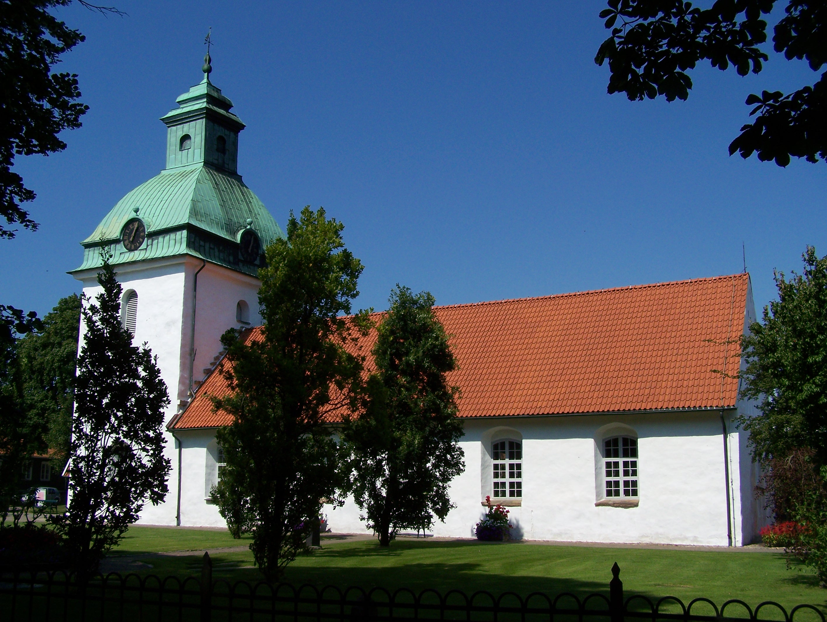 Sankt Laurentii kyrka, Falkenberg, Sverige.